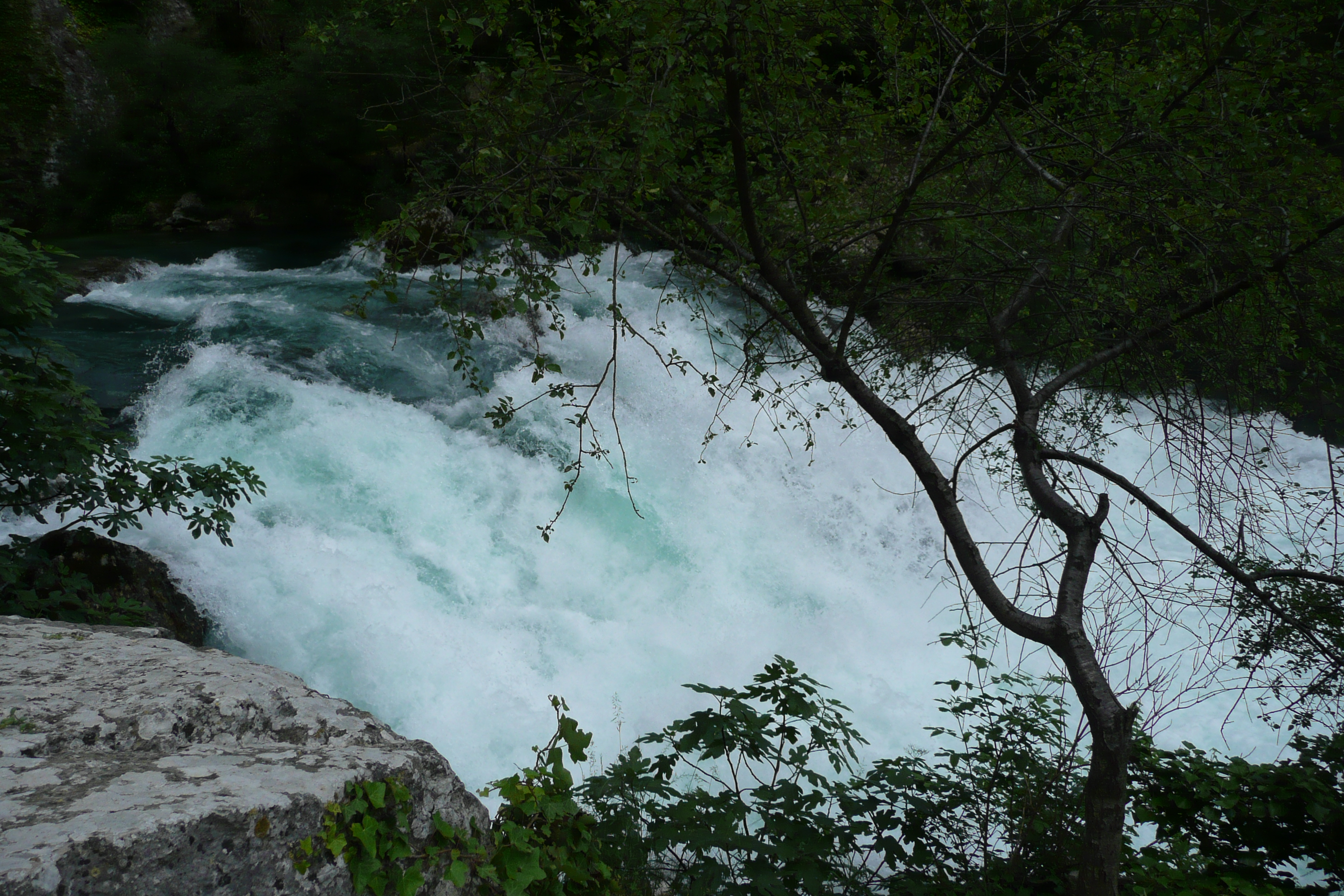 La Sorgue le 31 mai 2008 avec 1,53 mètres de hauteur, La Fontaine de Vaucluse.